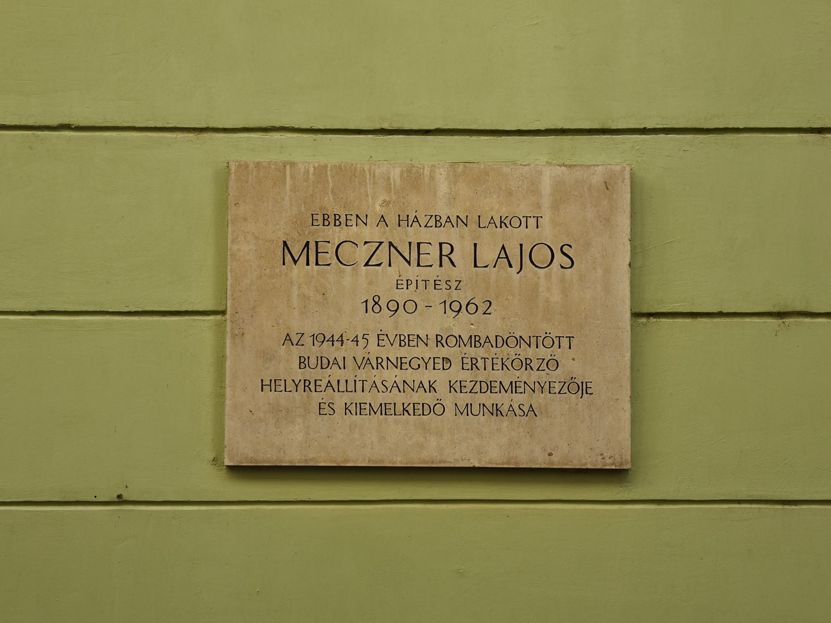 Meczner Lajos építész emléktáblája a budavári Móra Ferenc utcában